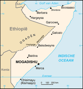 Nederlandse vertaling CIA-kaart door Danielm.